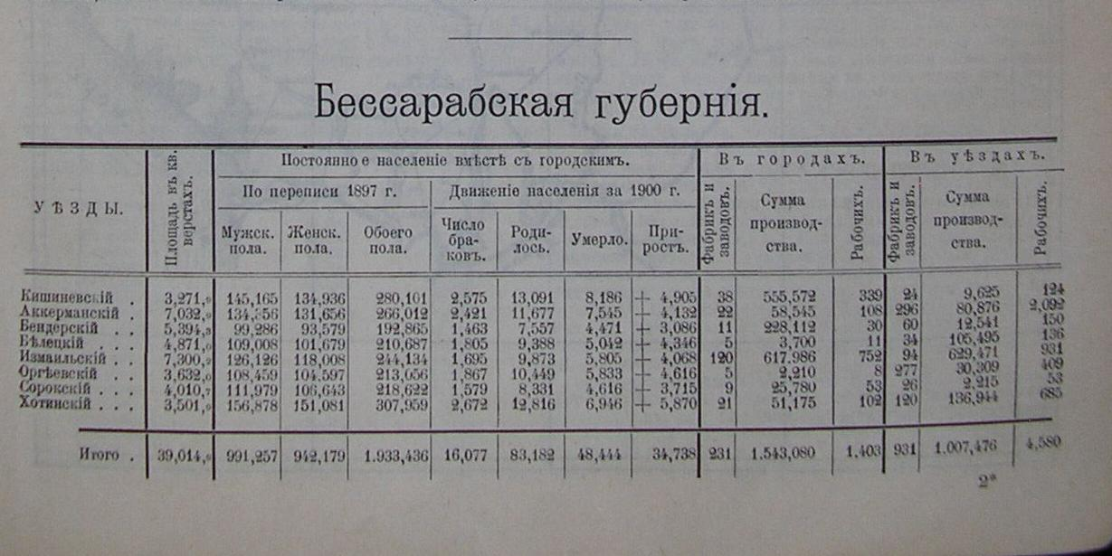 Стр. 45 из адрес-календаря Российской империи "Вся Россия", 1902.